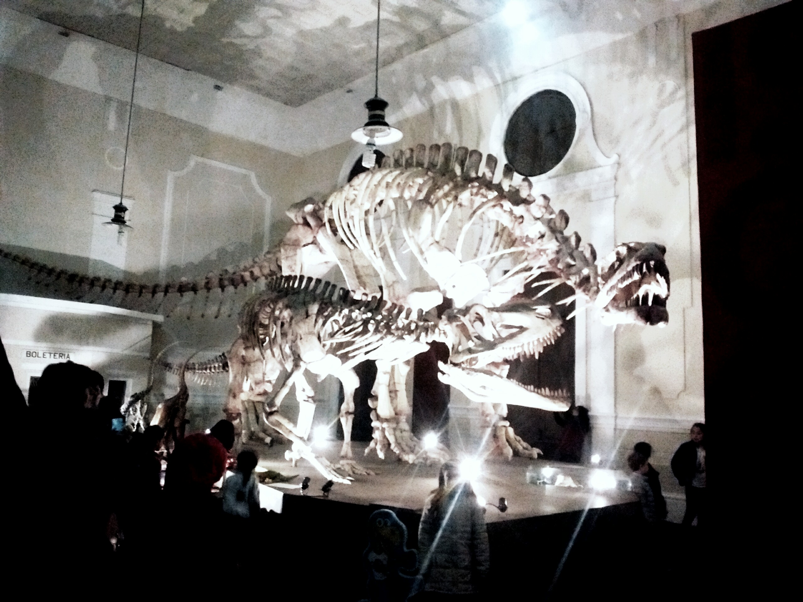 Recreación de la batalla entre un Lessemsaurus y el temible Fasolasuchus